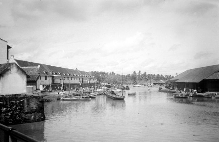 Repronegatief. Batavia, de haven van Pasar Ikan